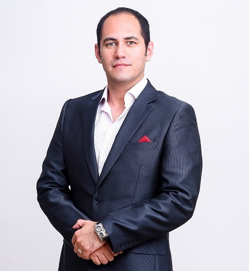 Presidente Ejecutivo de Miss Sudamérica